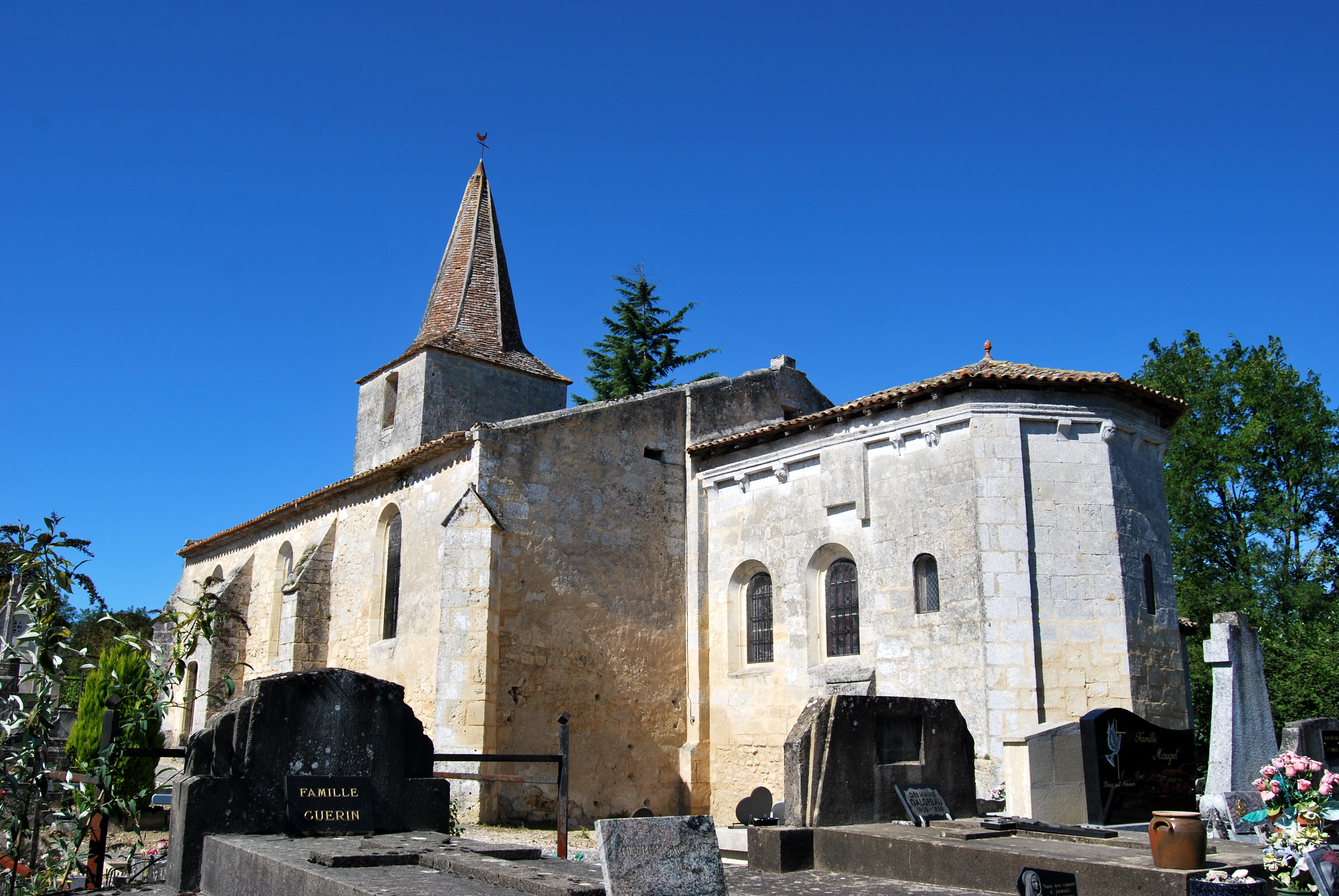 Église Saint-Cyr de Saint-Ciers-d'Abzac .